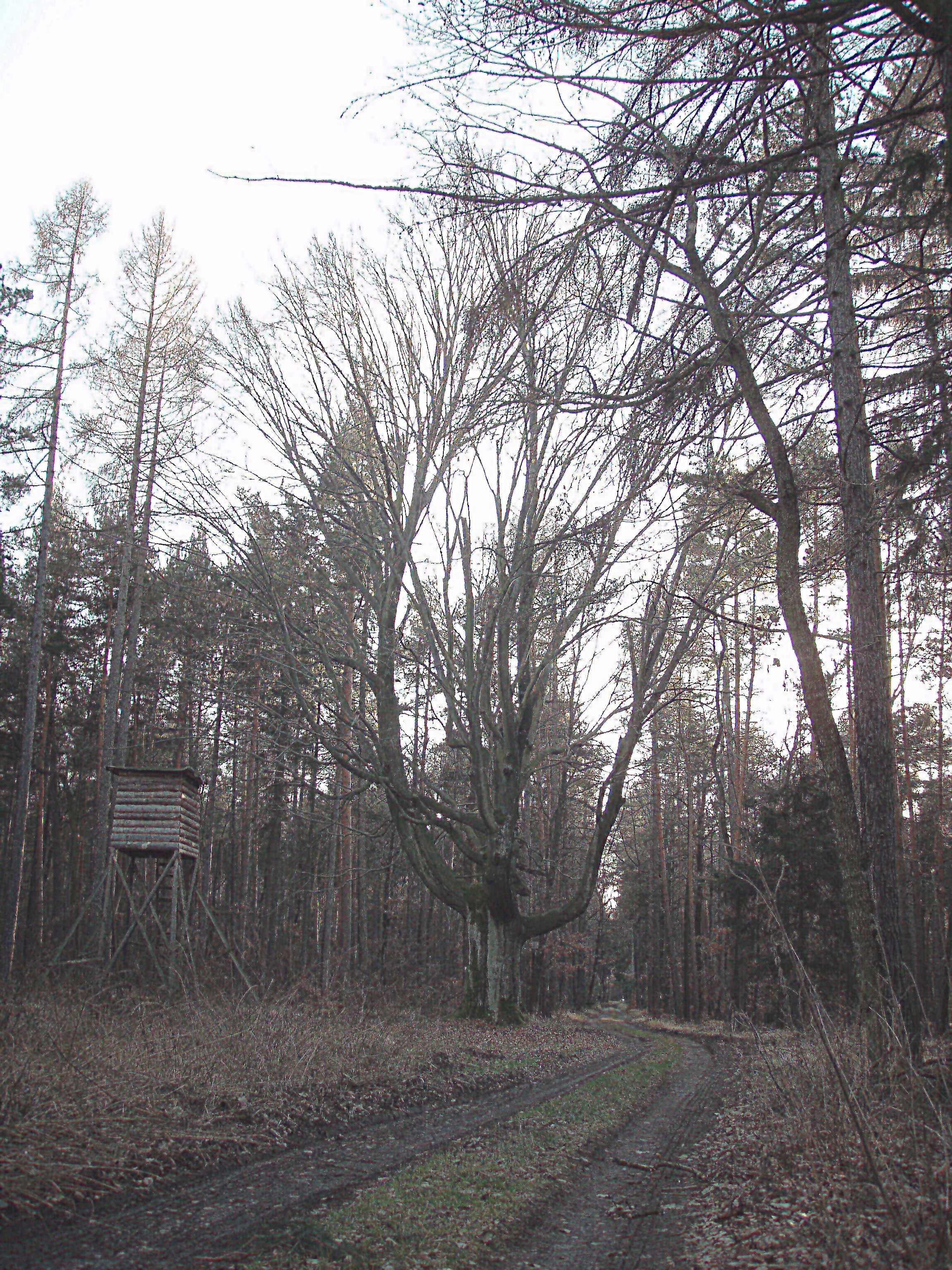 Buk v Budlíně ze severoseverovýchodu.